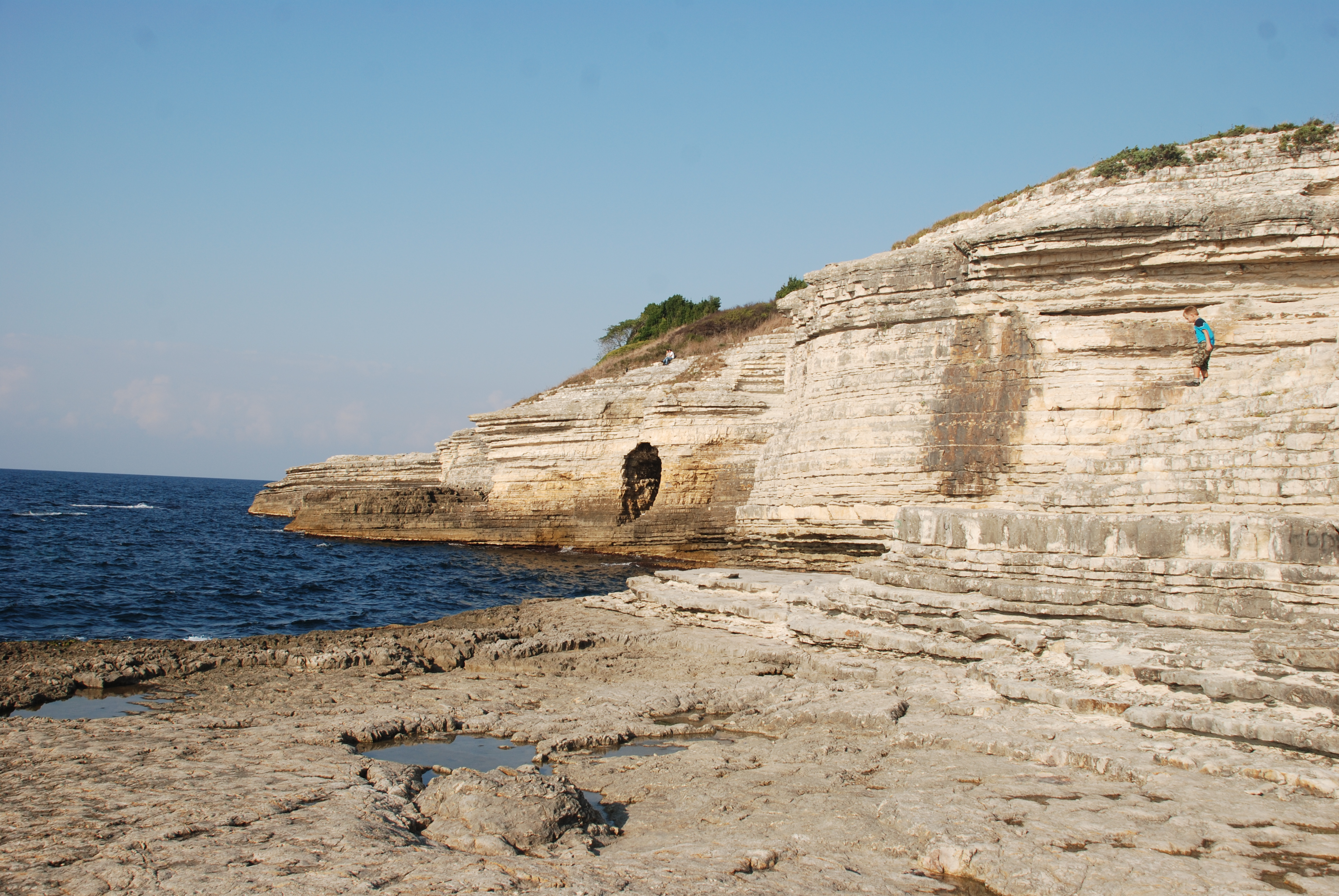 Kerpe'den bir görüntü.